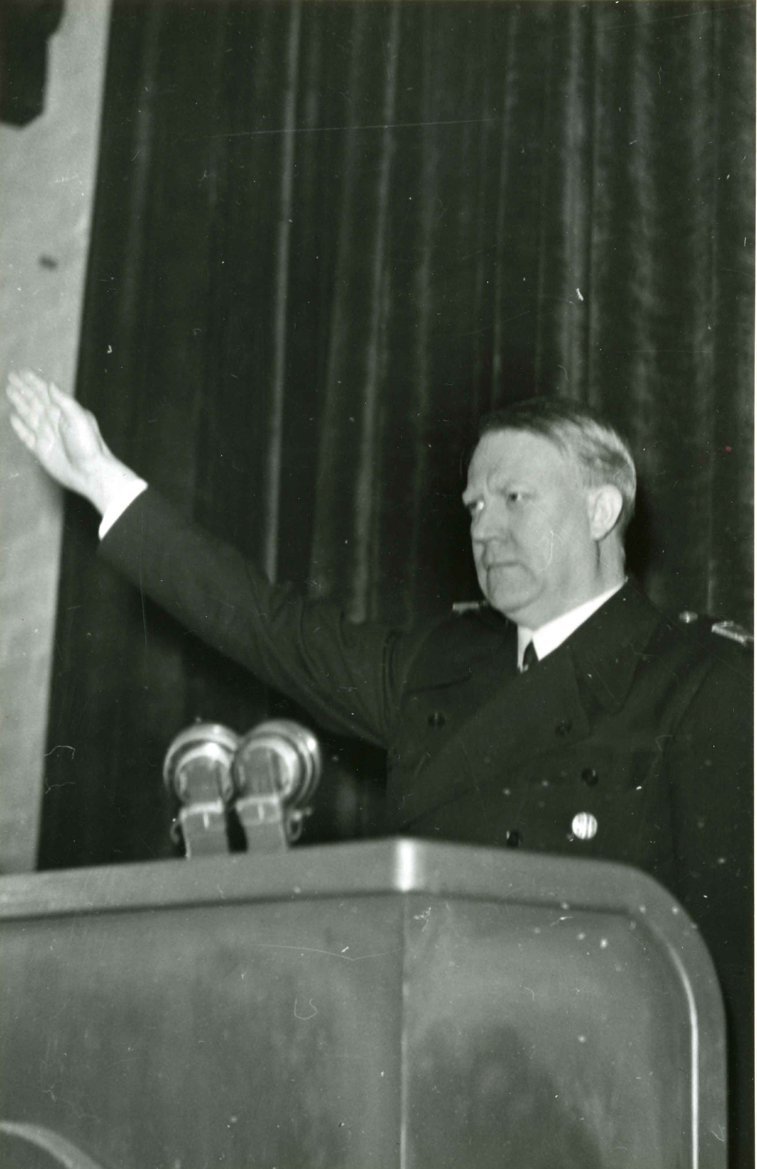 I forbindelse med Statsakten. Fotograf: trolig NTB. Fra album: 1-2-1942. RA/PA-0750/H/0002/ 1024 «Statsakten» var en seremoni på Akershus slott i Oslo under andre verdenskrig 1. februar 1942 da rikskommissar Josef Terboven innsatte Vidkun Quisling, leder for Nasjonal Samling (NS), som «ministerpresident» i Norge, og de tyskkontrollerte kommissariske ministerne ble erstattet av «den nasjonale regjering» utgått fra NS. «Statsakten» markerte at Quisling fikk den formelle makta i Norge, og ved lov av 12. mars 1942 ble NS «statsbærende parti». Quisling hadde håp om at ordninga også skulle gi NS reell makt og føre til fred mellom Norge og Tyskland, men tysk tilsynsforvaltninga gjennom Reichskommissariat Norwegen fortsatte som før inntil frigjøringa 8. mai 1945.